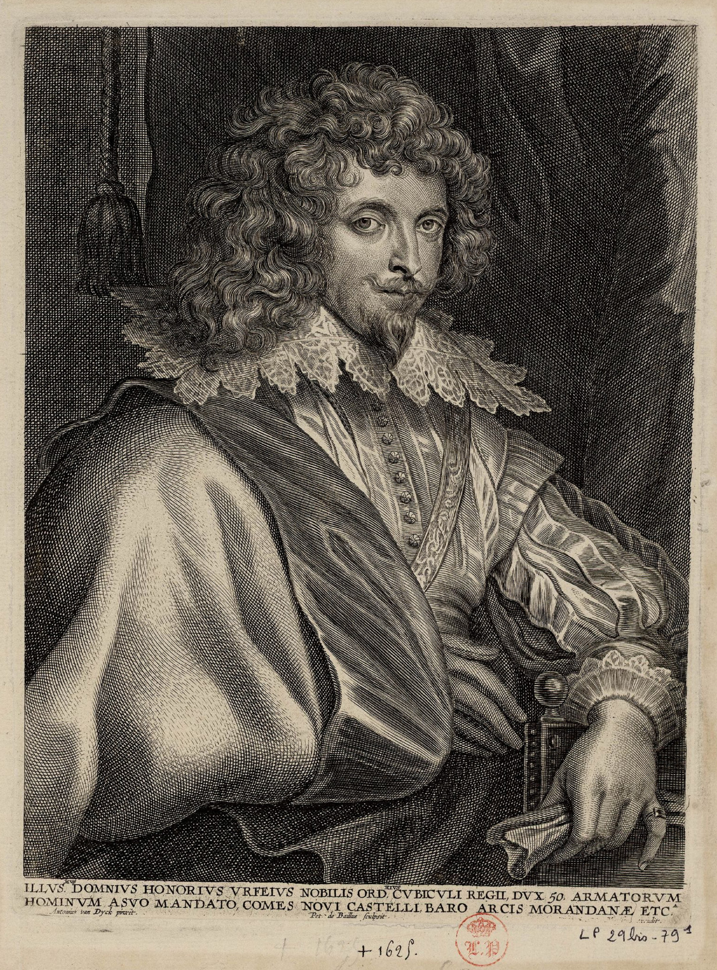 Honoré d'Urfé (* 1568; † 1625), französischer Schriftsteller